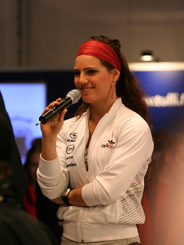 Finnish boxer Eva Wahlström